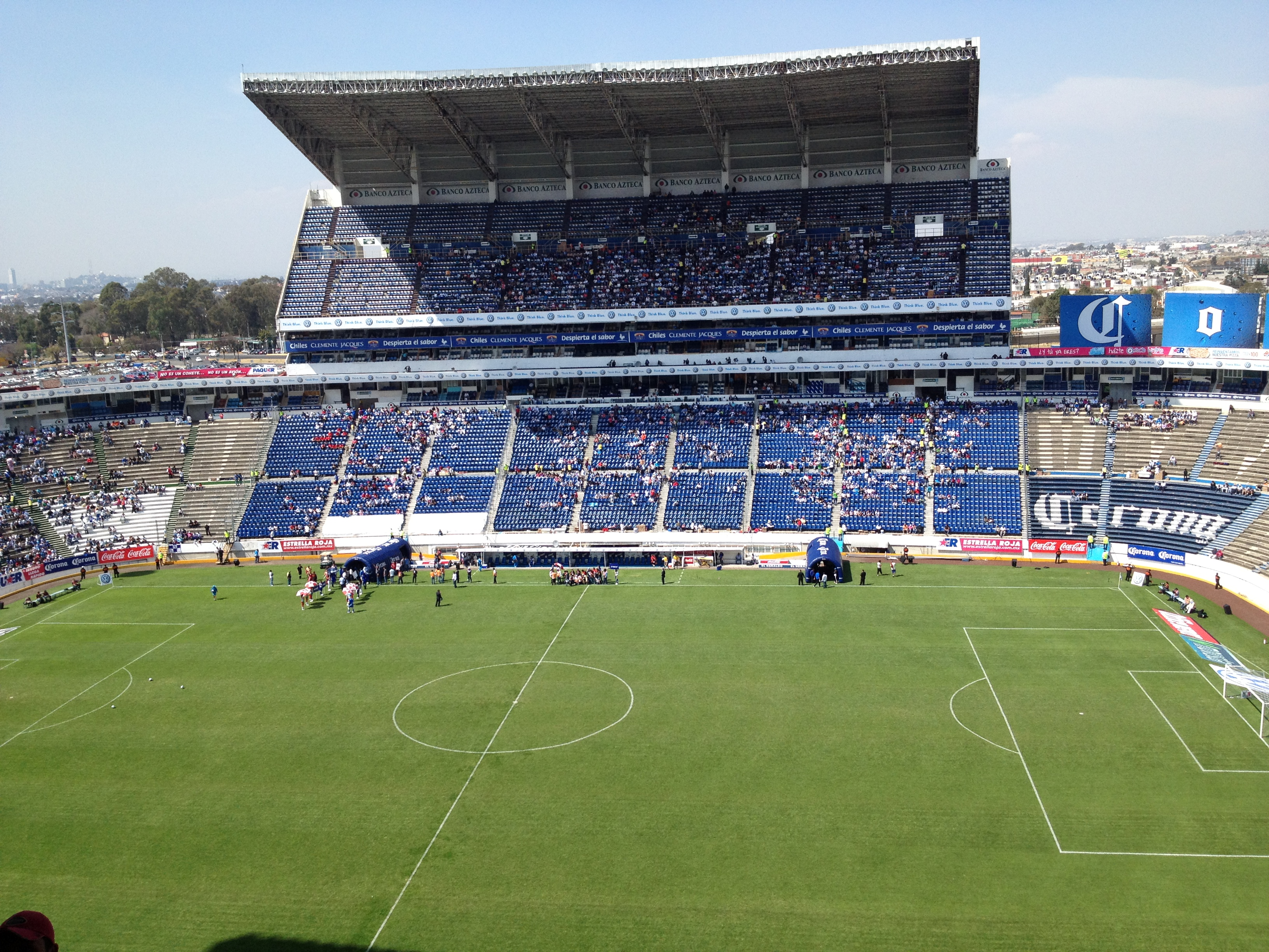 Fotografía del estadio Cuauhtémoc de la ciudad de Puebla, Puebla, México.